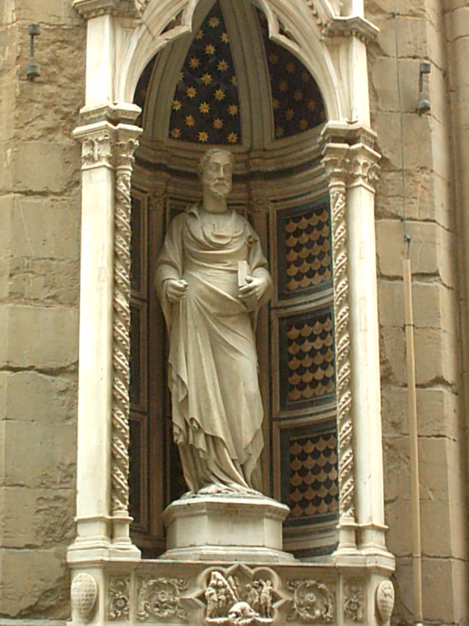 Statua in marmo di San Jacopo patrono dell'Arte dei Vaiai nel tabernacolo della chiesa di Orsanmichele a Firenze attribuita a Niccolò di Pietro Lamberti (1422 ca.)